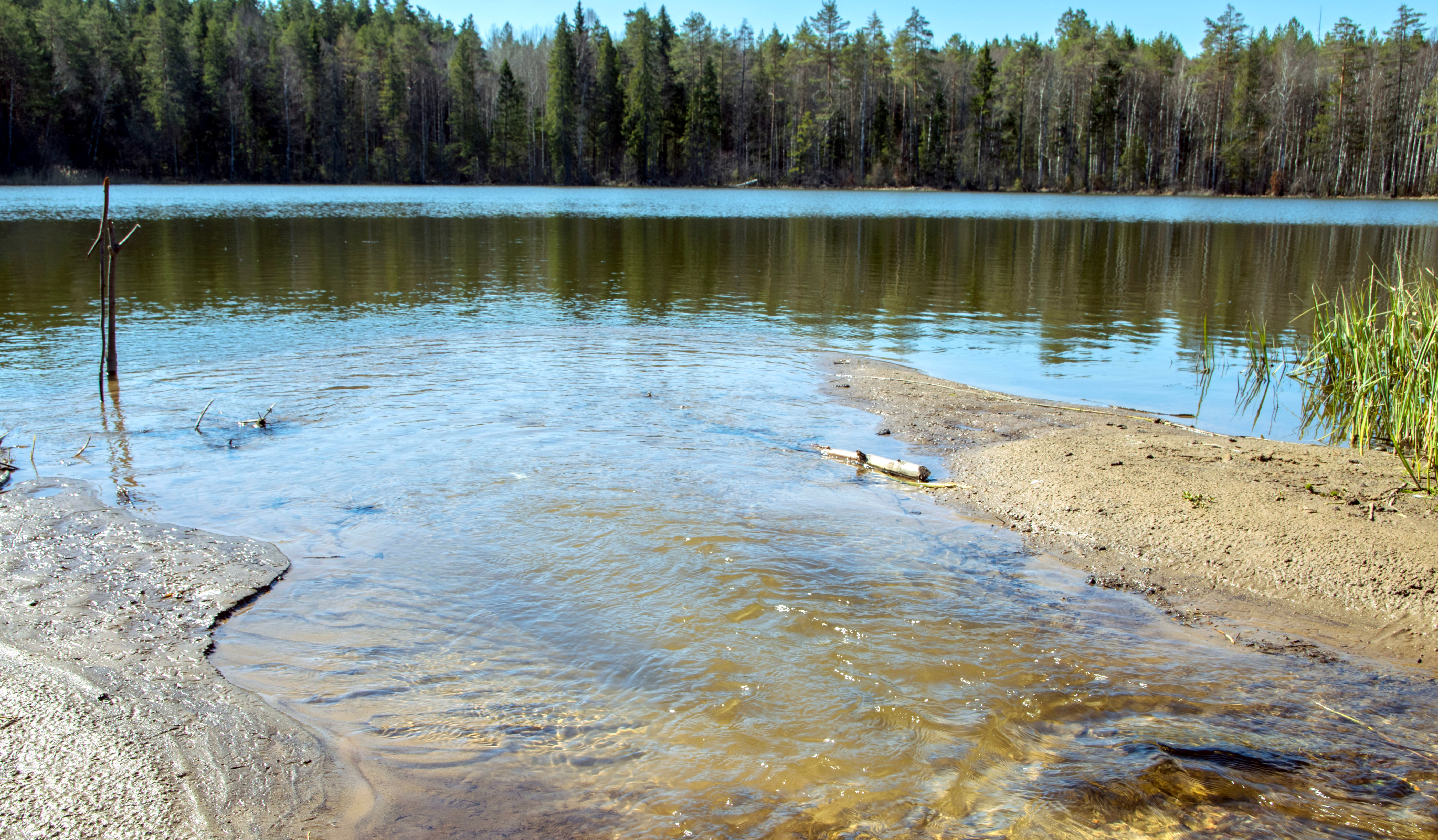 Быковщинское озеро: расположено в 300 м от бывшей д. Быковщина и д. Полетаевщина и в 12 км от п. Лесотехникум по дороге Советск – Киров, Советский район, Кировская область. This image is related to the protected area of Russia number 4310237